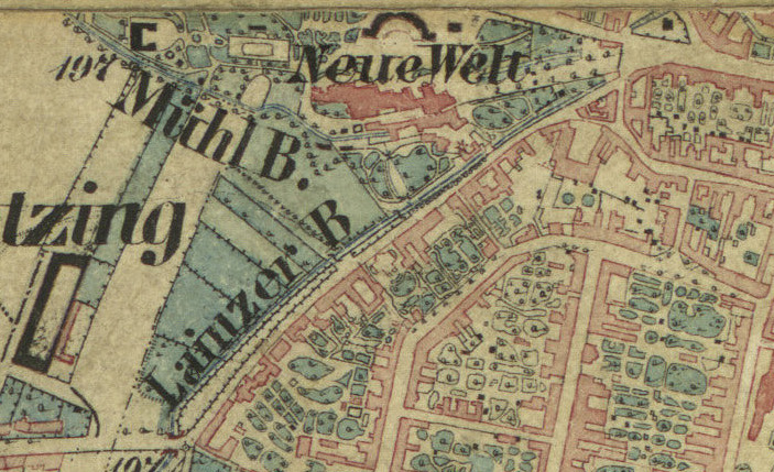 historische Landkarte: Gradkartenblatt Zone 13 Colonne XIV Section b4 (später 4756/2d). Südwesten von Wien, Hetzendorf, Liesing. Franzisco-josephinische (3.) Landesaufnahme der österreichisch-ungarischen Monarchie. Aufnahmeblatt 1:12.500. Aufgenommen 1872